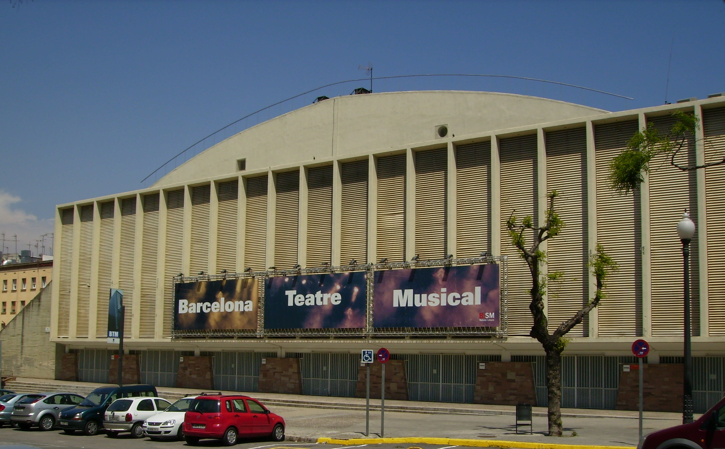 Barcelona Teatre Musical, antic Palau d'Esports